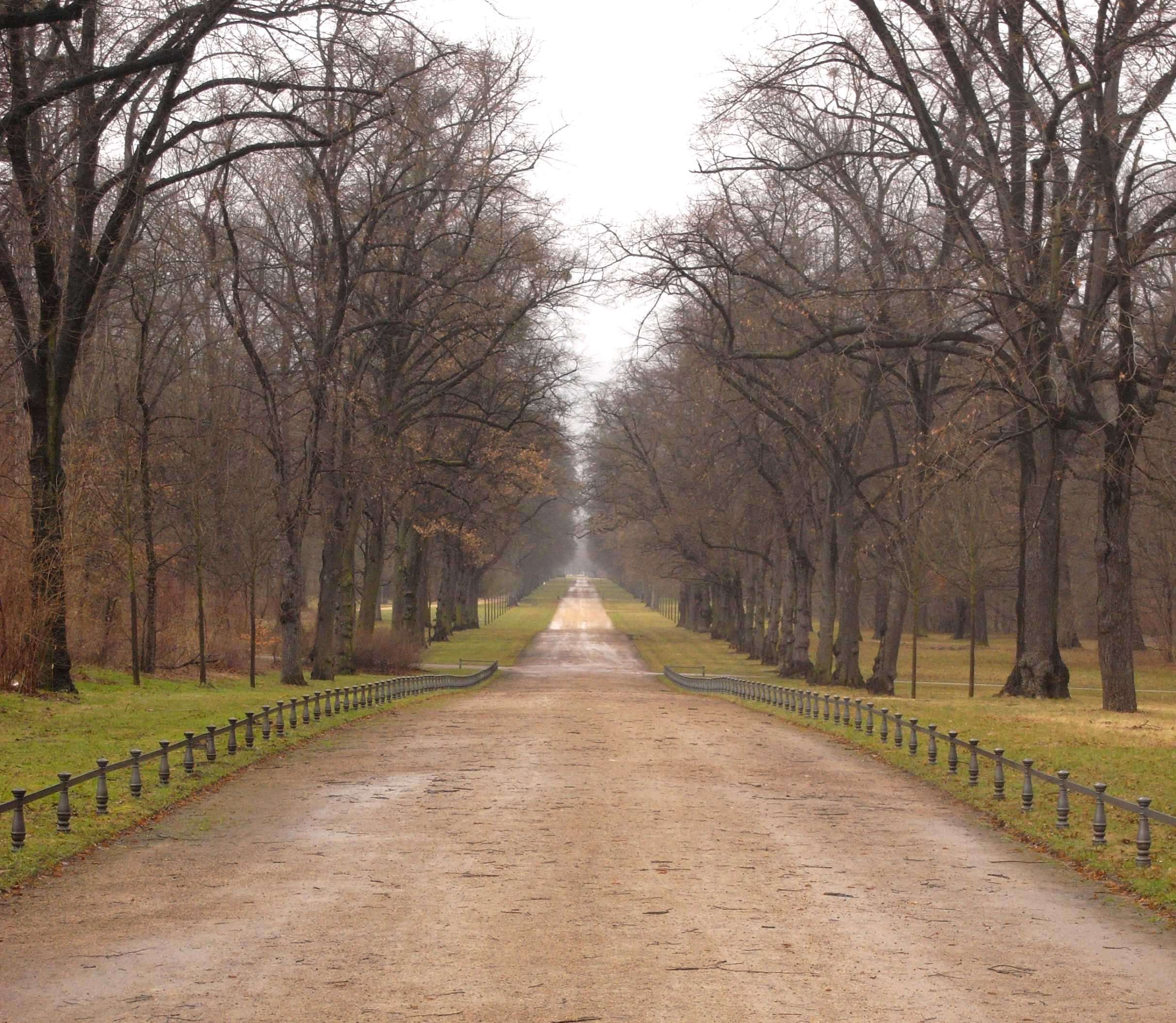 Grosser Garten, Südallee, Blick nach Westen (Dresden, Sachsen, Deutschland)